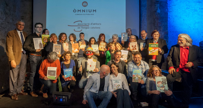 Autors guanyadors a la Festa de La Llança 2015